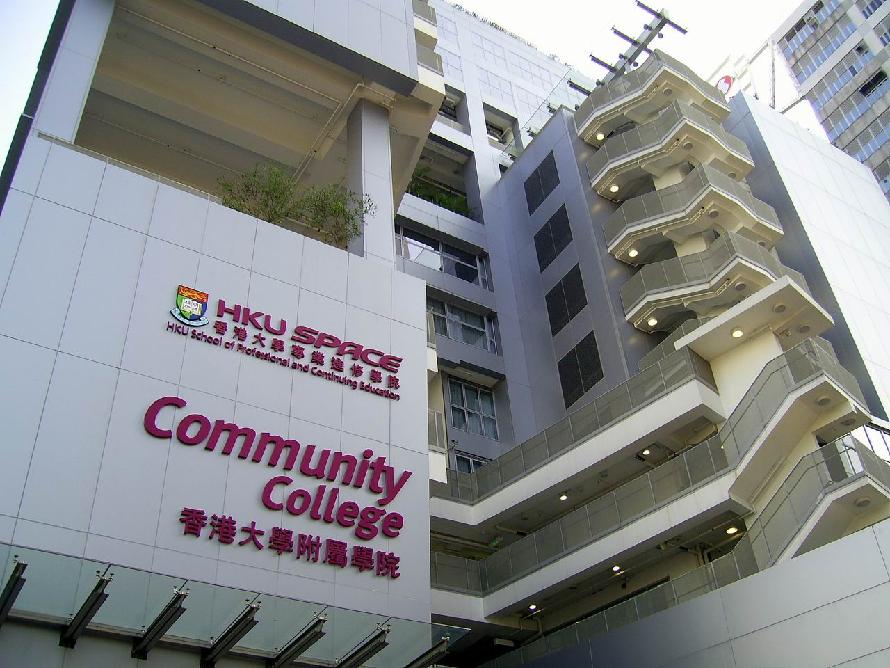 香港大學附屬學院